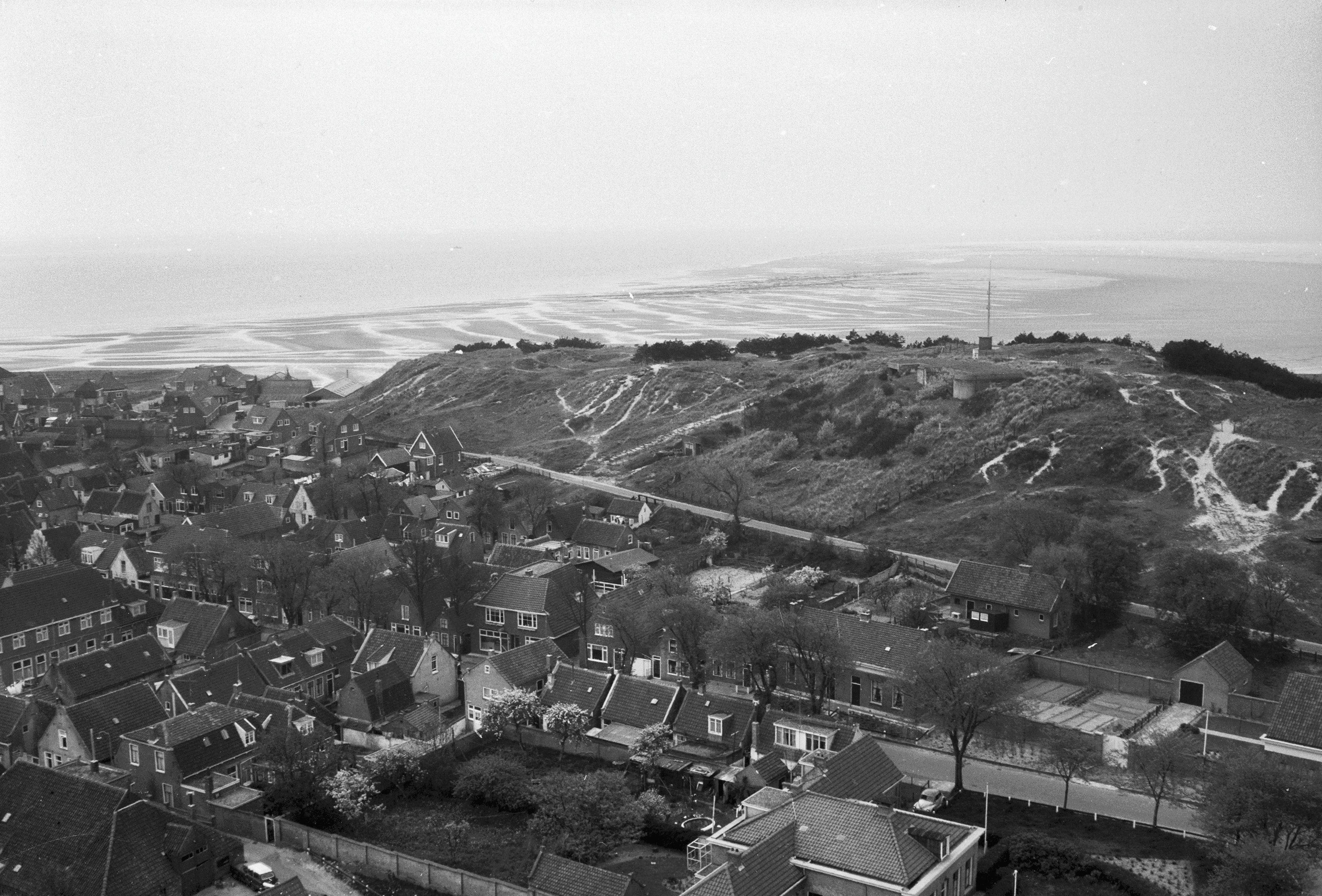 naar west-zuid-west richting